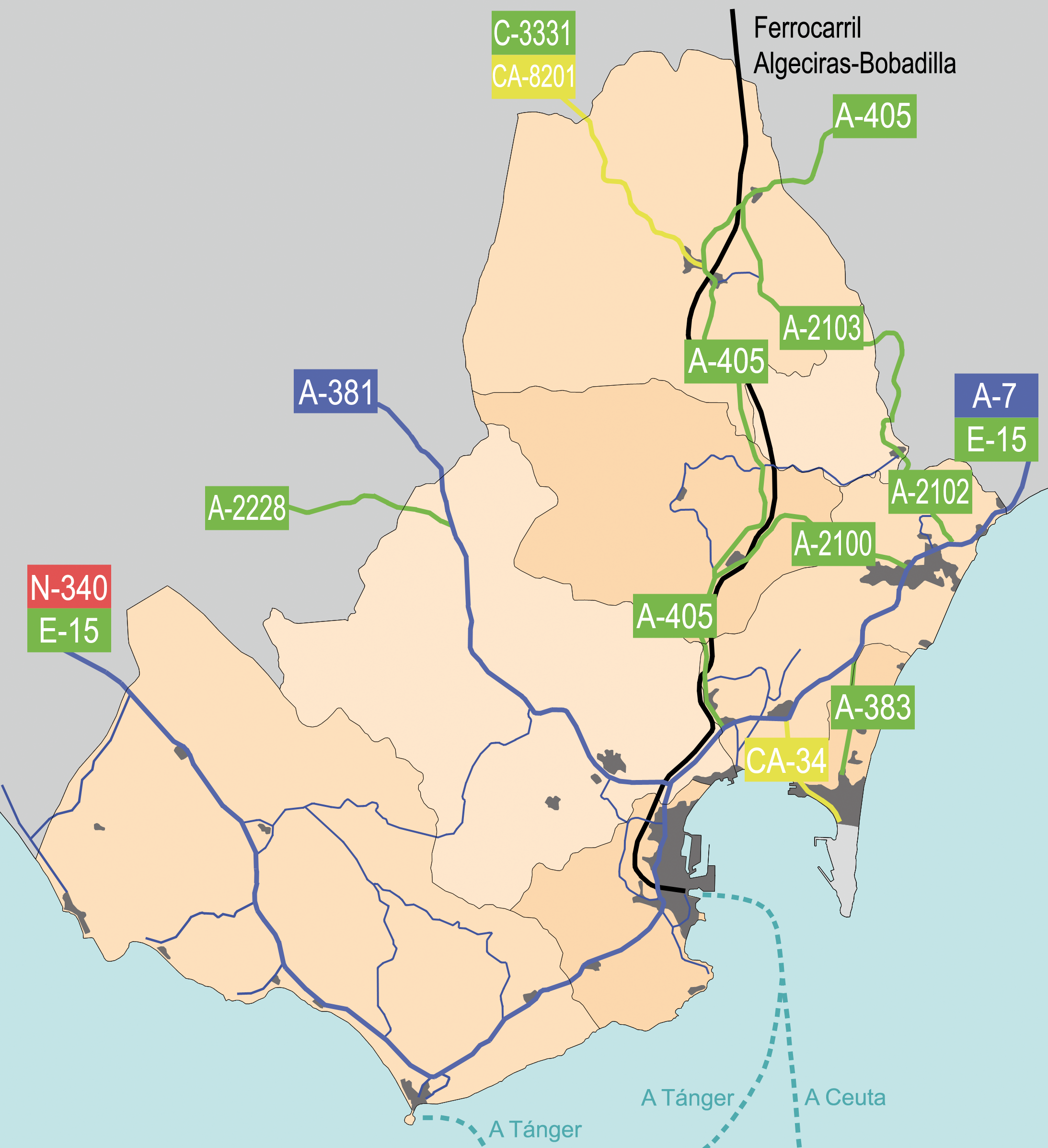 Mapa indicativo de las vías de comunicación del Campo de Gibraltar, Andalucía, España